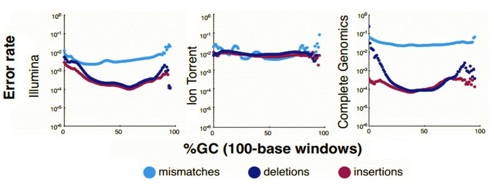 Grafikai GC tendencingumui stebėti.